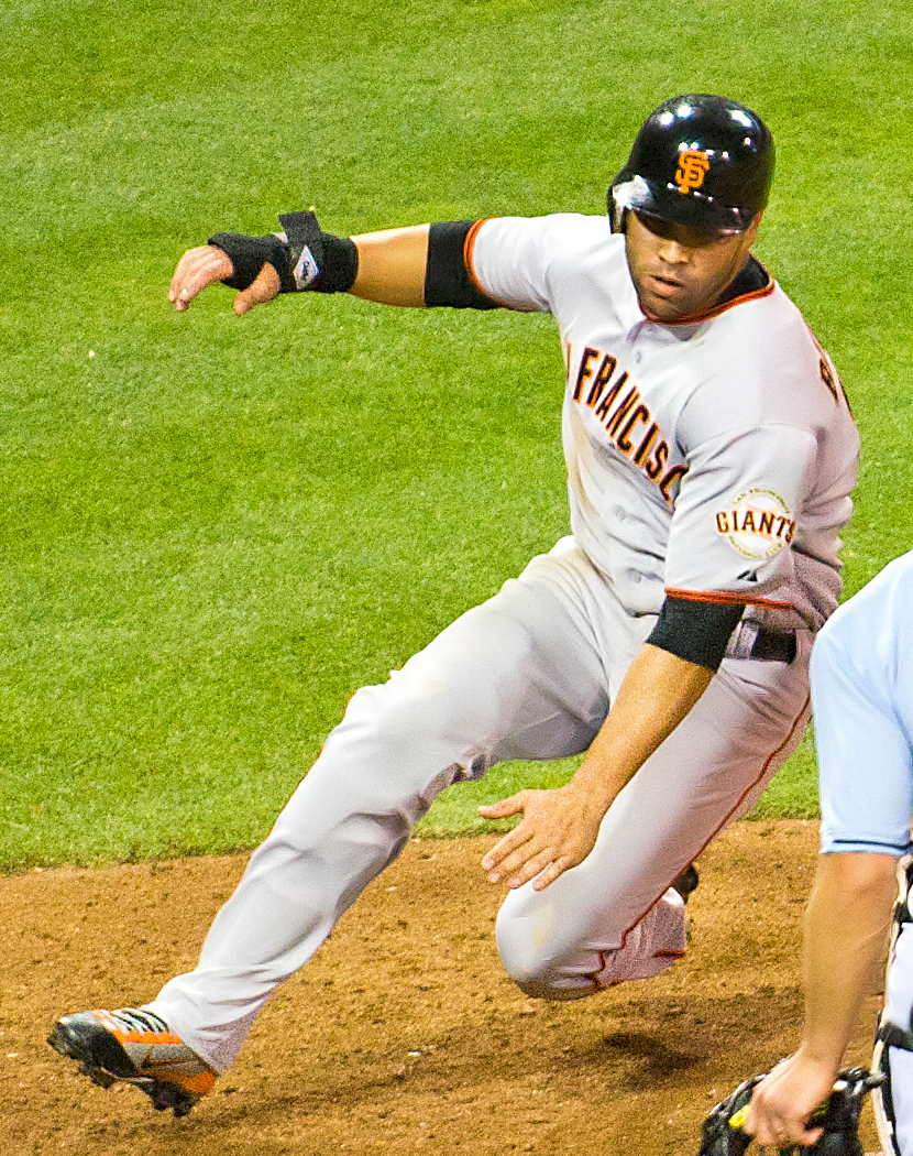 Carlos Beltrán